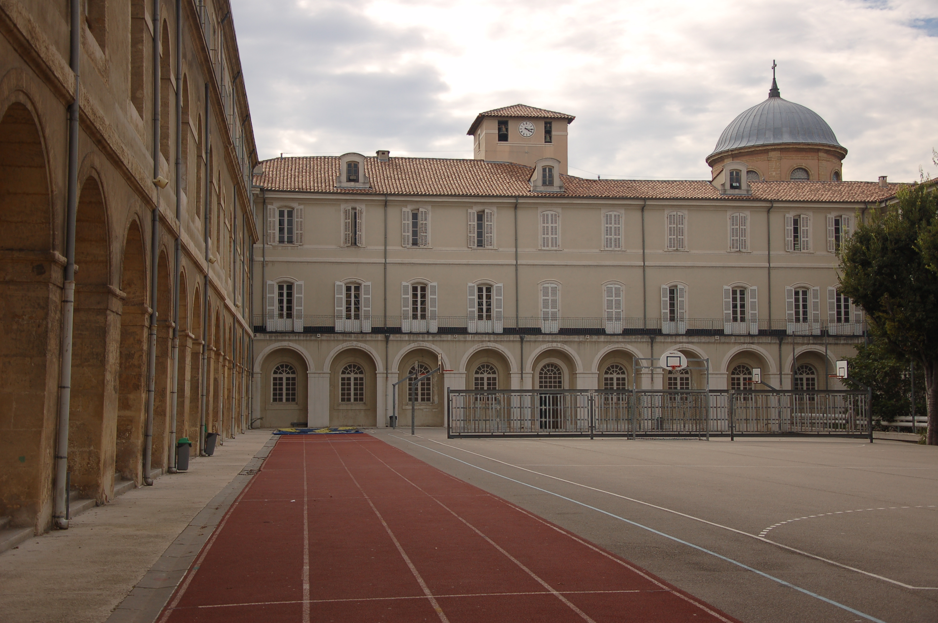 La cour du lycée Thiers, le plus ancien de Marseille, avec la Chapelle des Bernardines en arrière-plan (à droite)